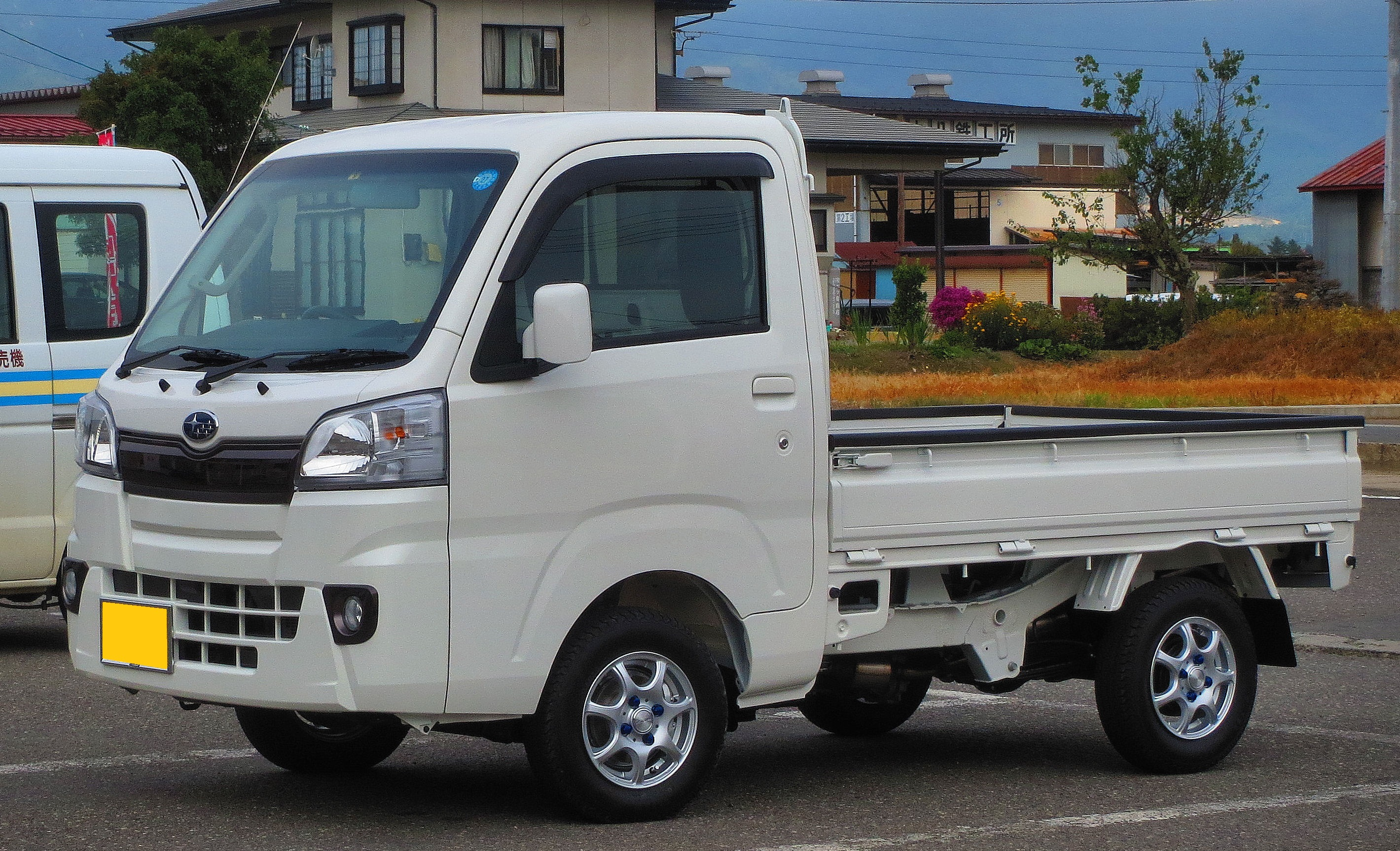 スバルサンバートラック TC AWD(スタイリッシュパック）